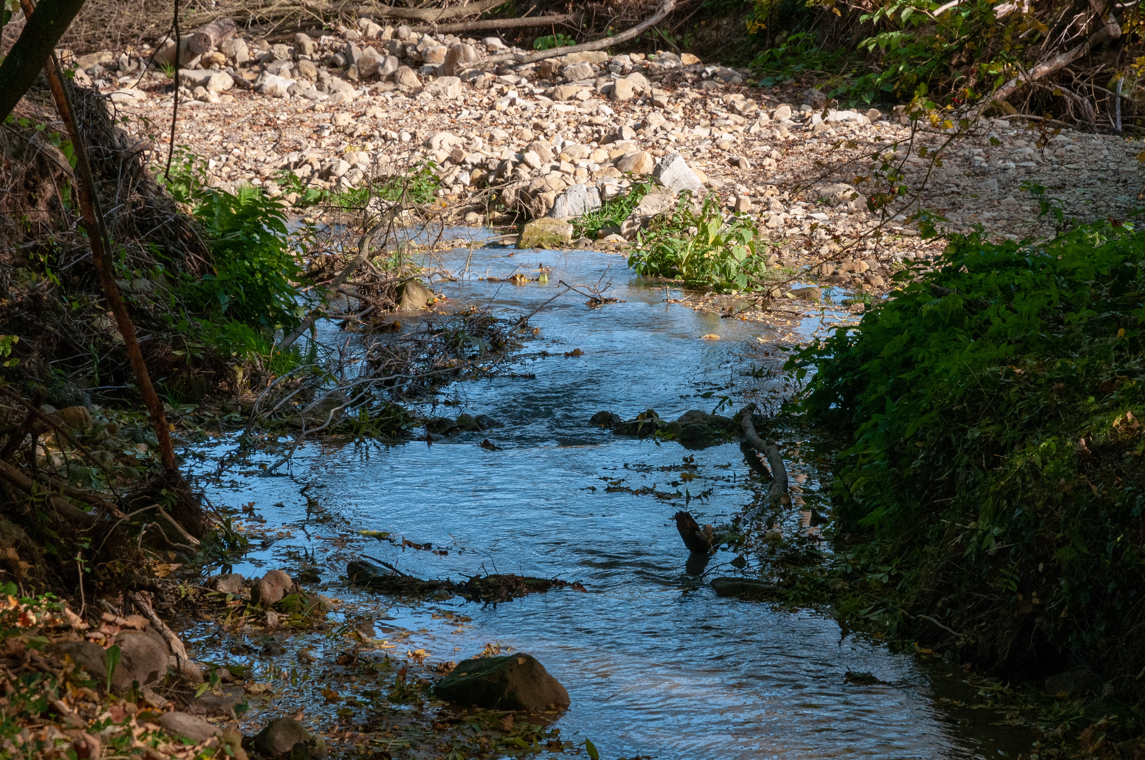 D'Äsbech kuerz vrum Zesummelaf an d'Sauer.